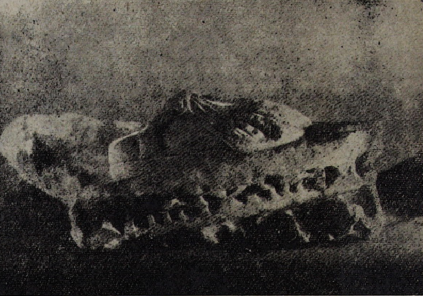 Մարմարե արձանի ոտք